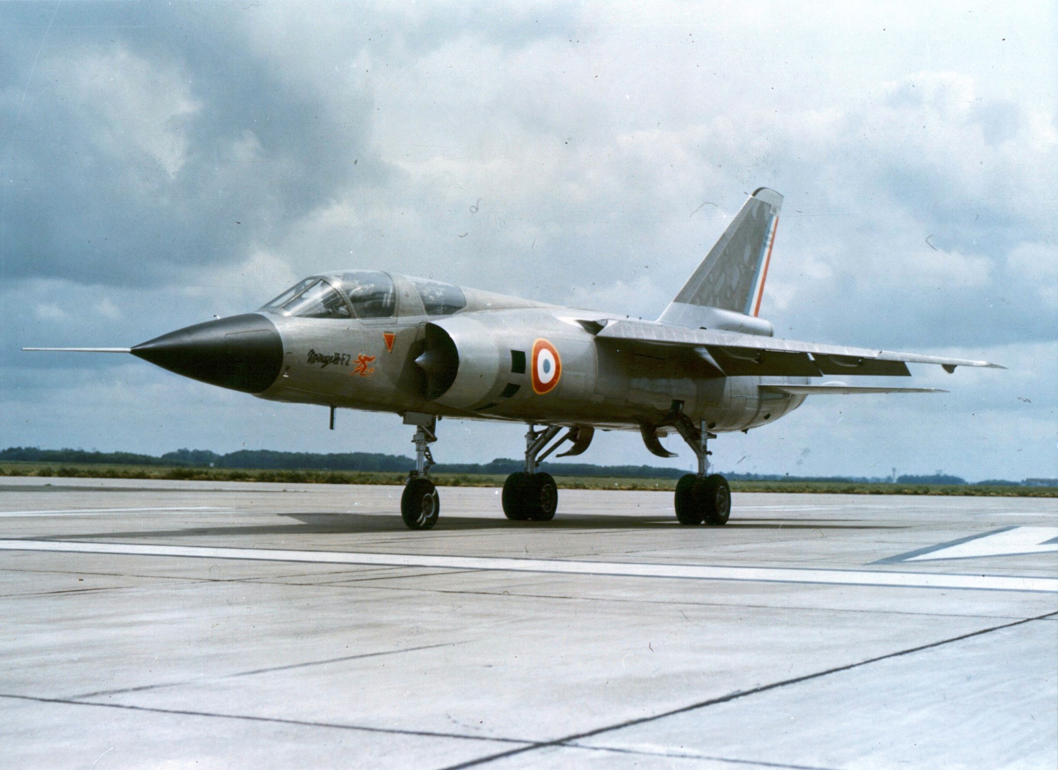 Dassault Mirage III F2